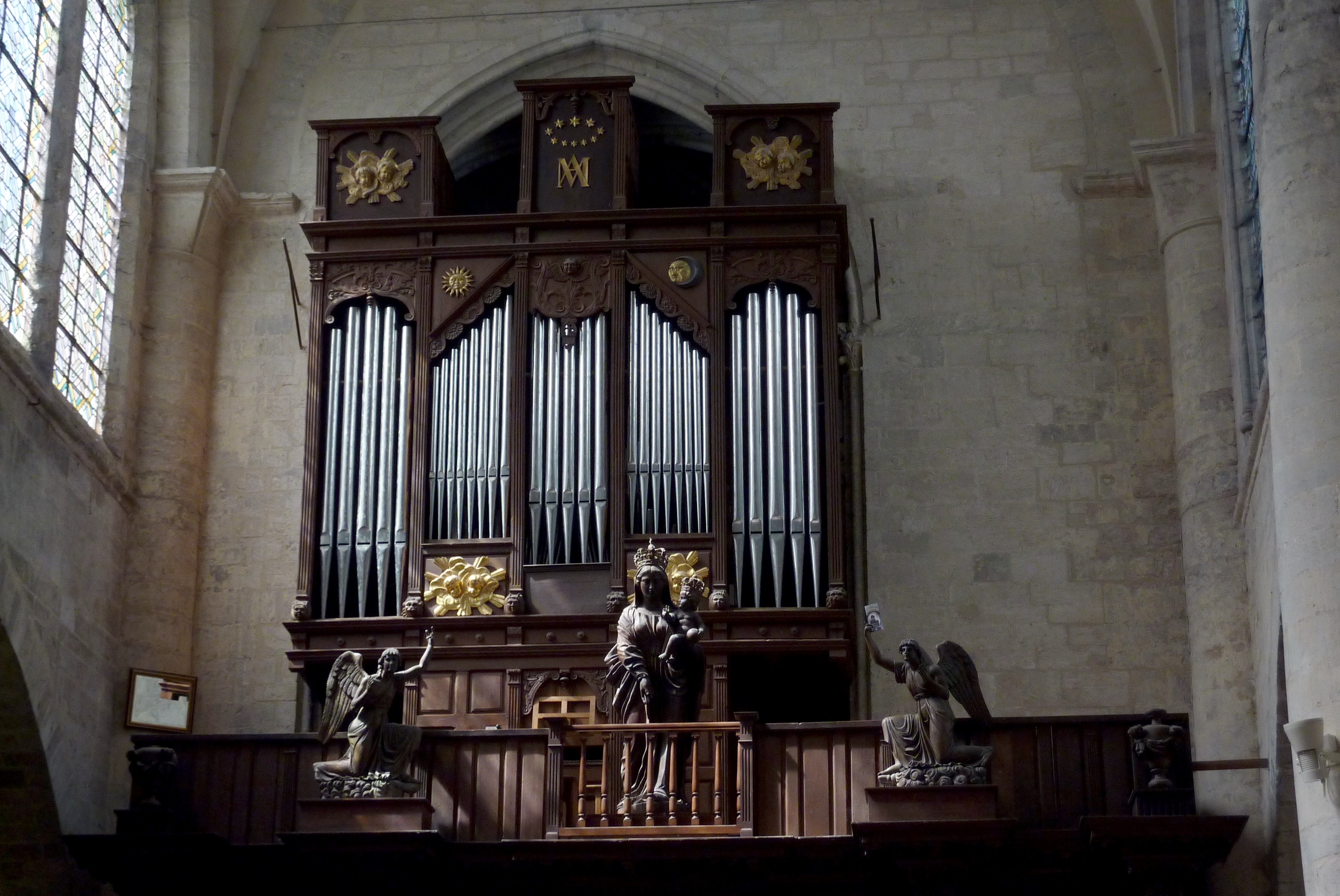 Katholische Pfarrkirche Notre-Dame-du-Fort in Étampes im Département Essonne in der Region Île-de-France (Frankreich), Orgel aus dem 16. Jahrhundert, 1843 restauriert von Marie Antoine Louis Suret